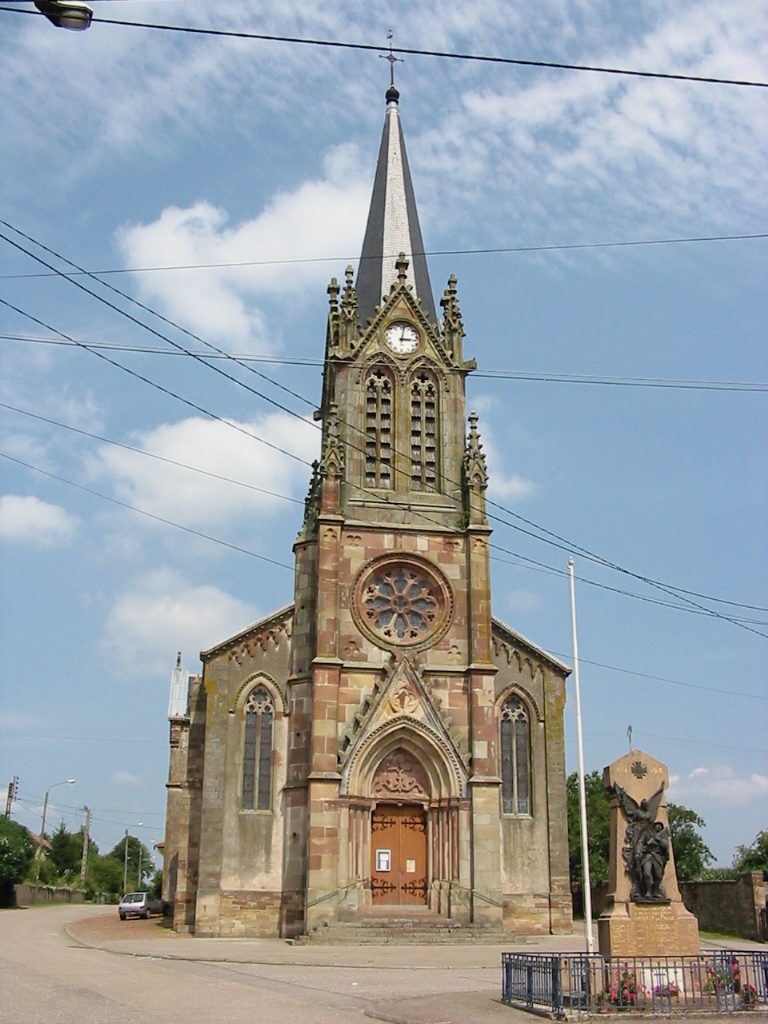 Église de Magnières (Meurthe-et-Moselle)